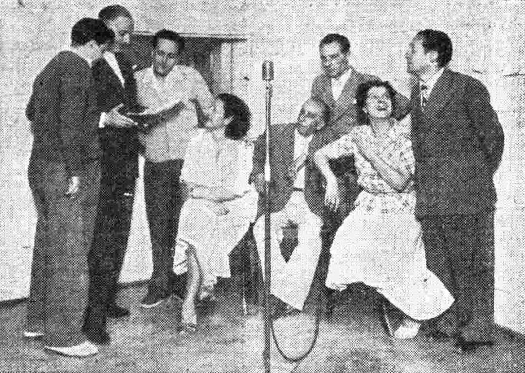 Complesso di prosa di Radio Napoli. Nella foto, da sinistra a destra Aldo Bovio, il regista Ernesto Grassi, gli interpreti Gennaro di Napoli, Lia Thomas, Salvatore Costa, Luigi Scateni Giulia Melidoni, Carlo Pennetti.